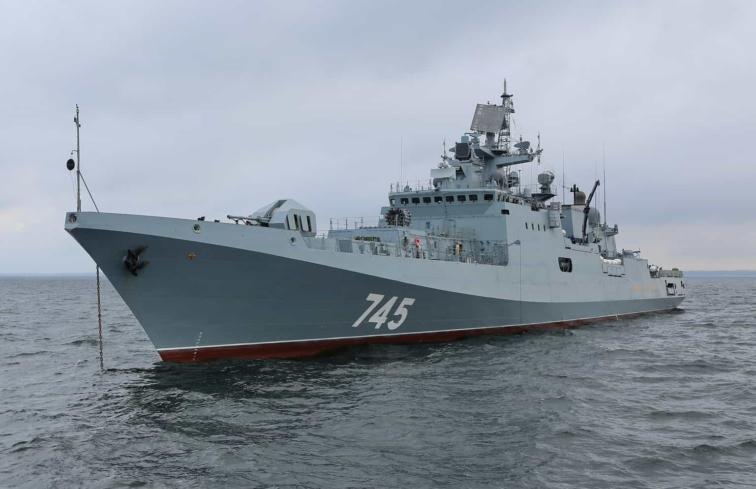 сторожевой корабль проекта 11356 "Адмирал Григорович"